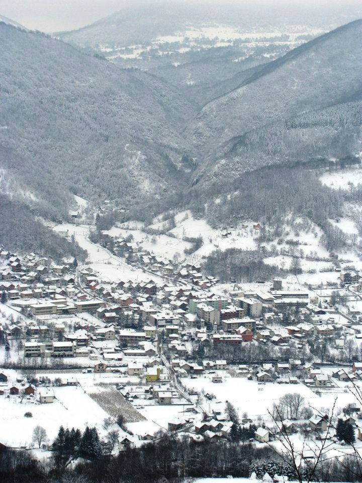 Шековићи под снијежним прекривачем